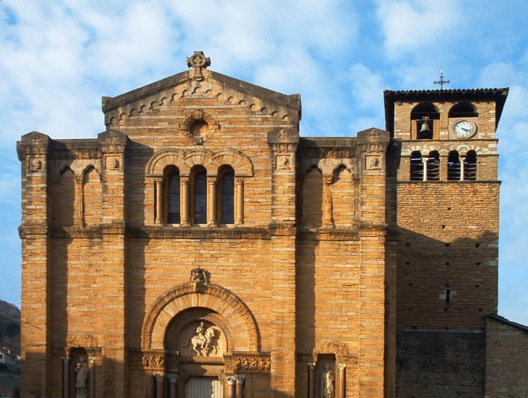 Église de Couzon-au-Mont-d'Or Photo prise par Pabix